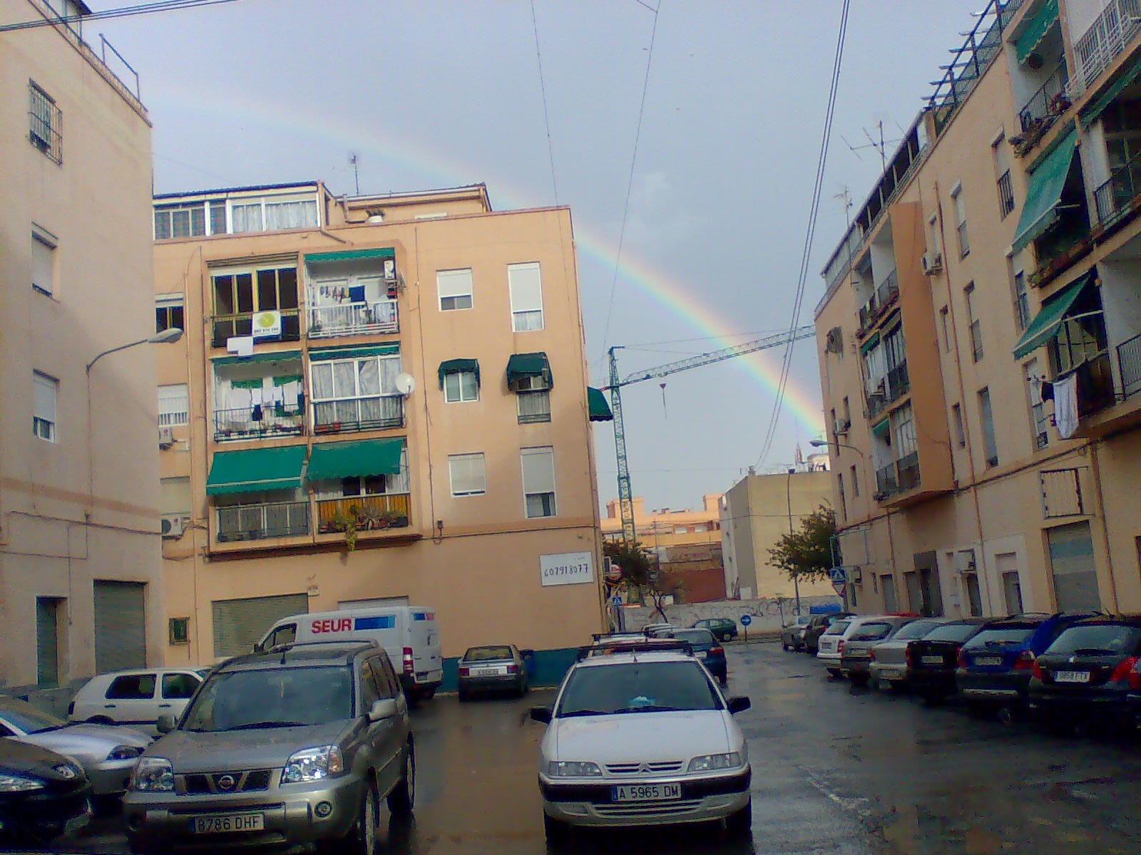 Vista de l'Arc de San Martí al barri de la Florida Baixa